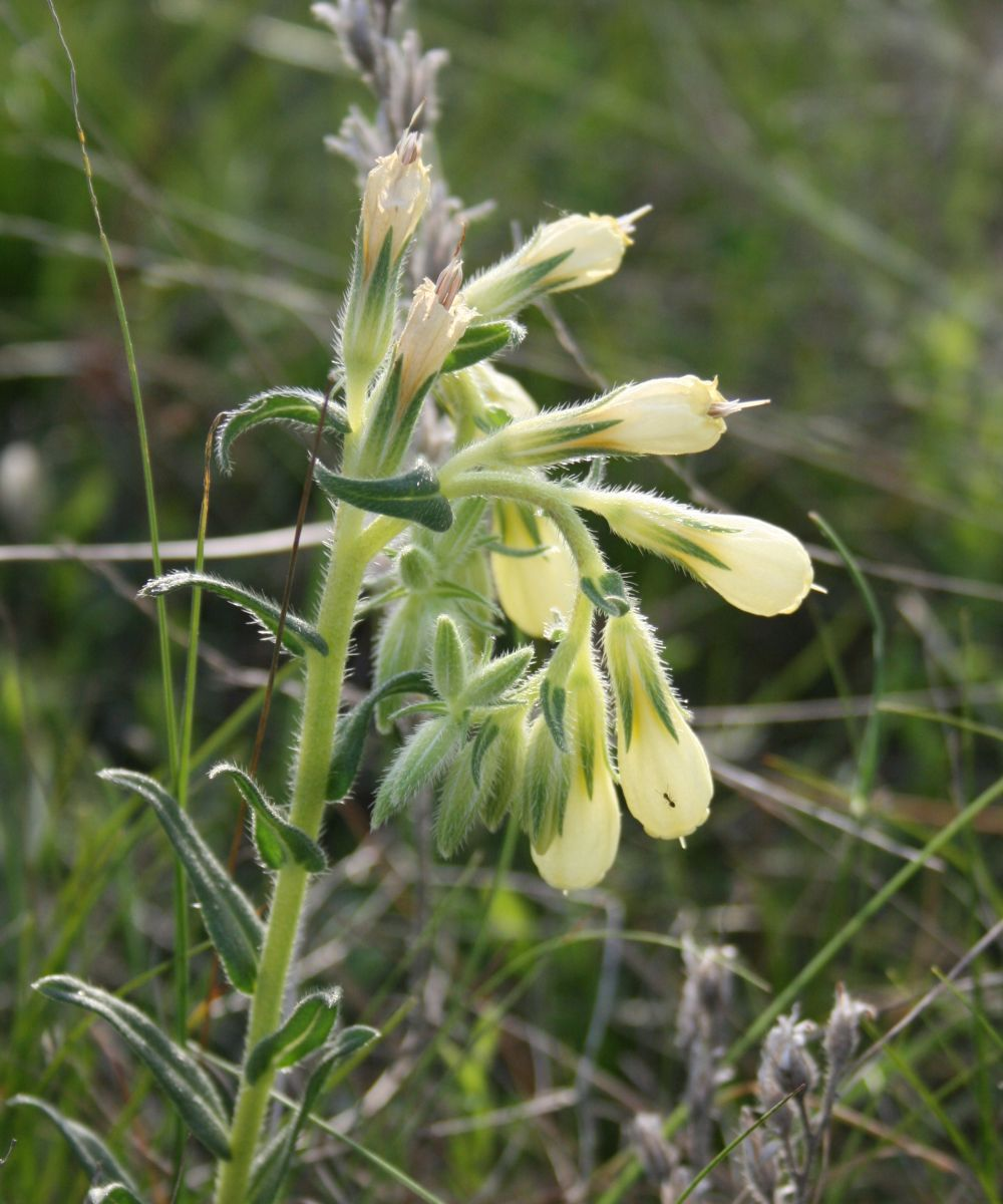 Onosma echioides subsp. dalmatica, Borretschgewächse (Boraginaceae) - Italien/Italia/Italy: Friuli-Venezia Giulia, Prov. Trieste, Monte Grisa